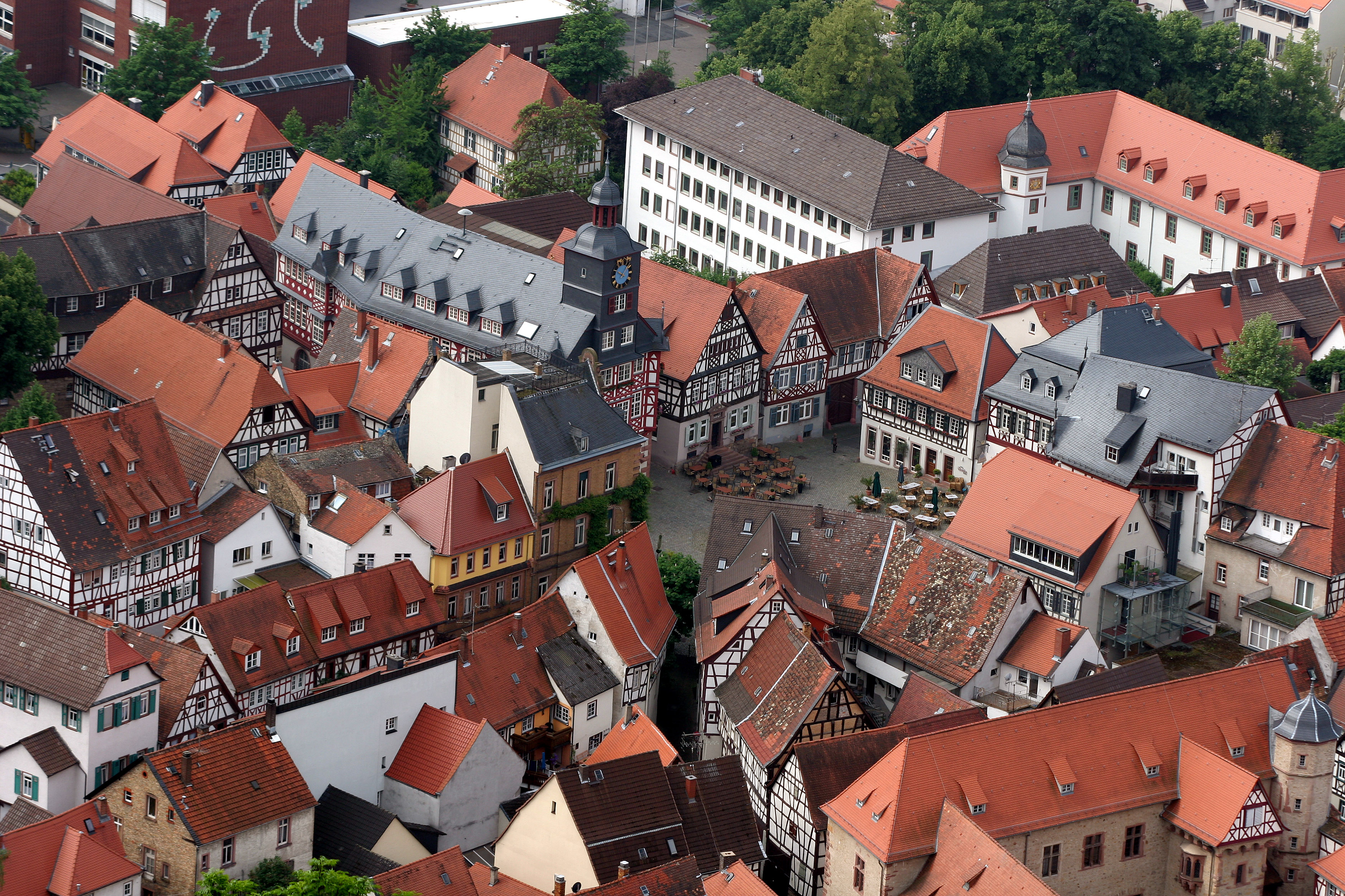 Blick auf das Zentrum der Altstadt der Stadt Heppenheim (Bergstraße) von der Starkenburg aus.